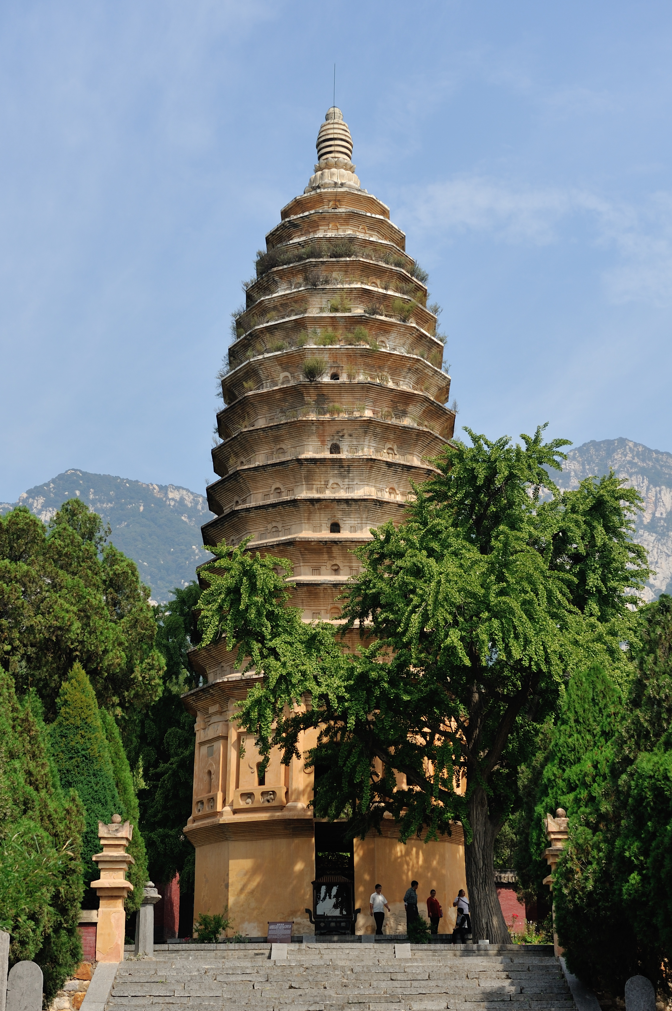 登封嵩岳寺塔